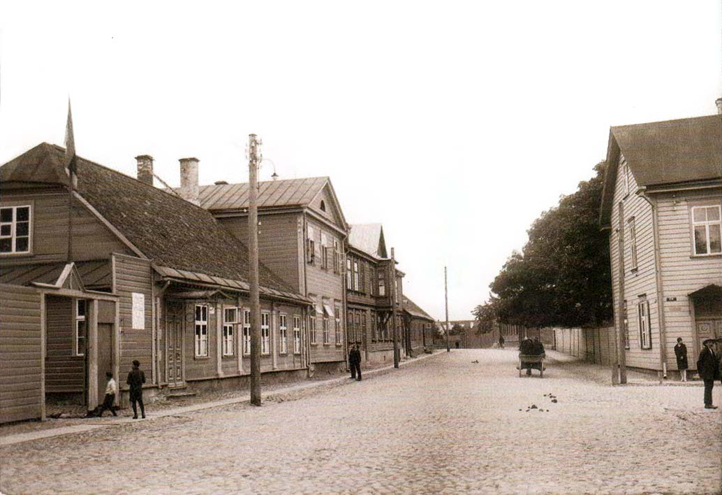 Jaama tänav Tartus